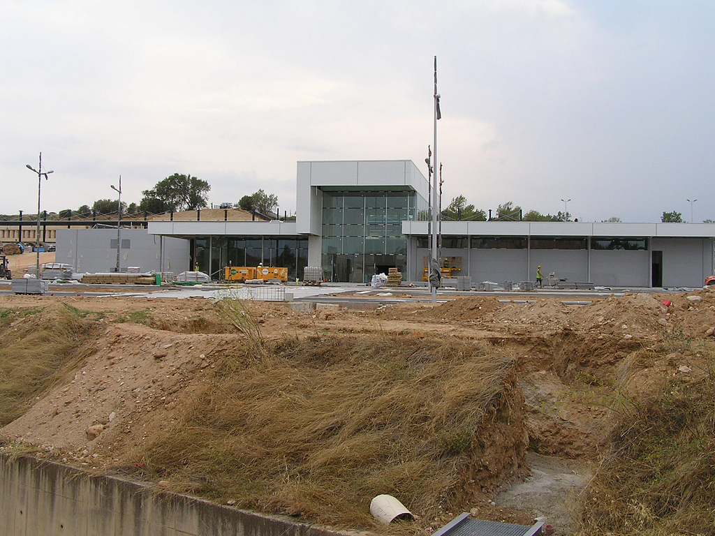 Obras de la estación de Figueres-Vilafant.